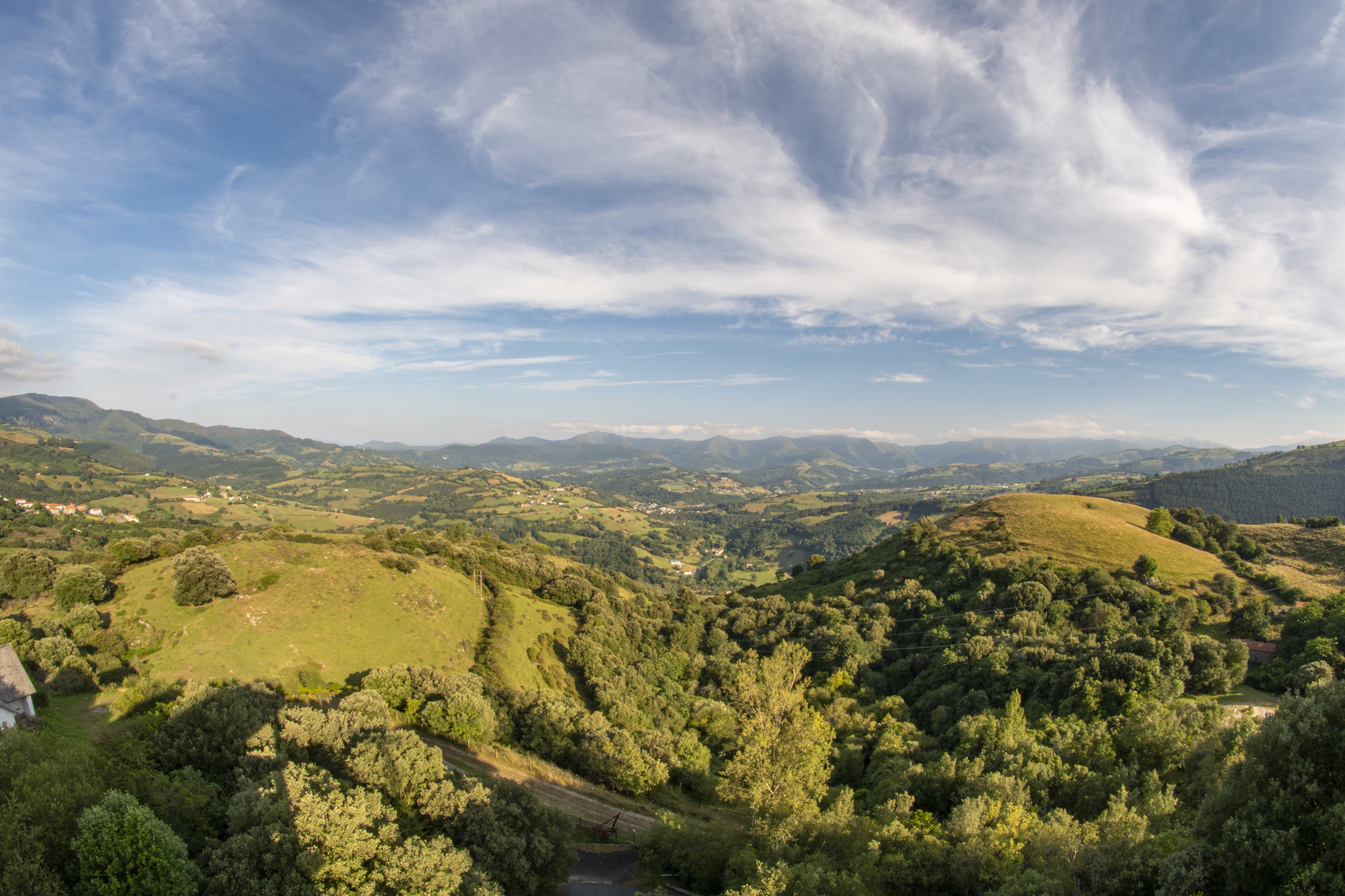 Karrantza harana Pozalaguatik ikusia Irudi hau Wikibizi kanpainaren baitan igo da, Euskal Wikilarien Kultura Elkarteak 2020an deitutako argazki lehiaketa hirukoitza. Helburua, Euskal Herria hobeto ezagutzen laguntzea da.Lagundu zuk ere irudi hau dagokion artikuluetan txertatzen.